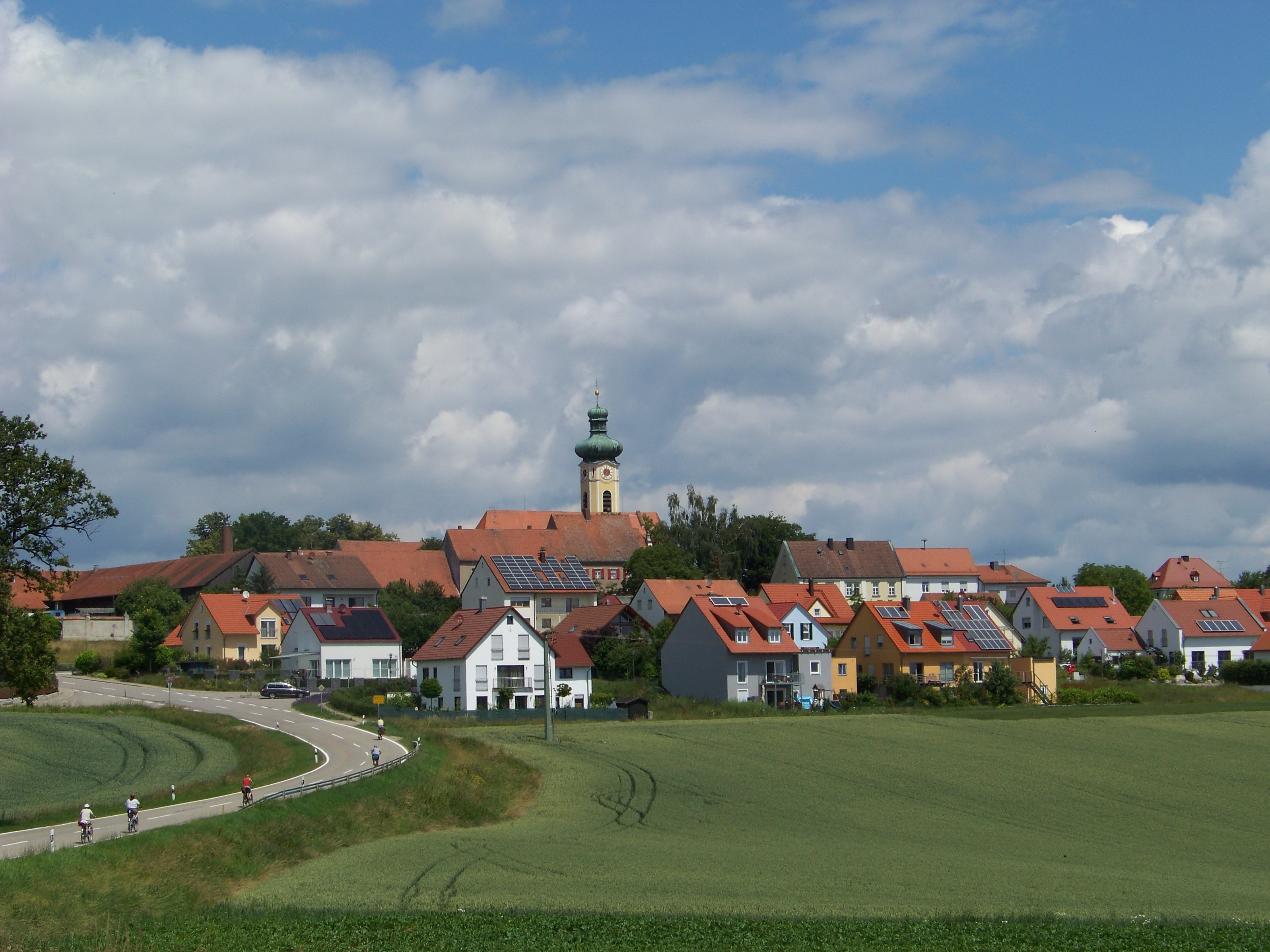 Pentling, Hohengebraching. Ortsansicht von Süden. In der Bildmitte die Kirche Mariä Himmelfahrt im neobarocken Baustil.